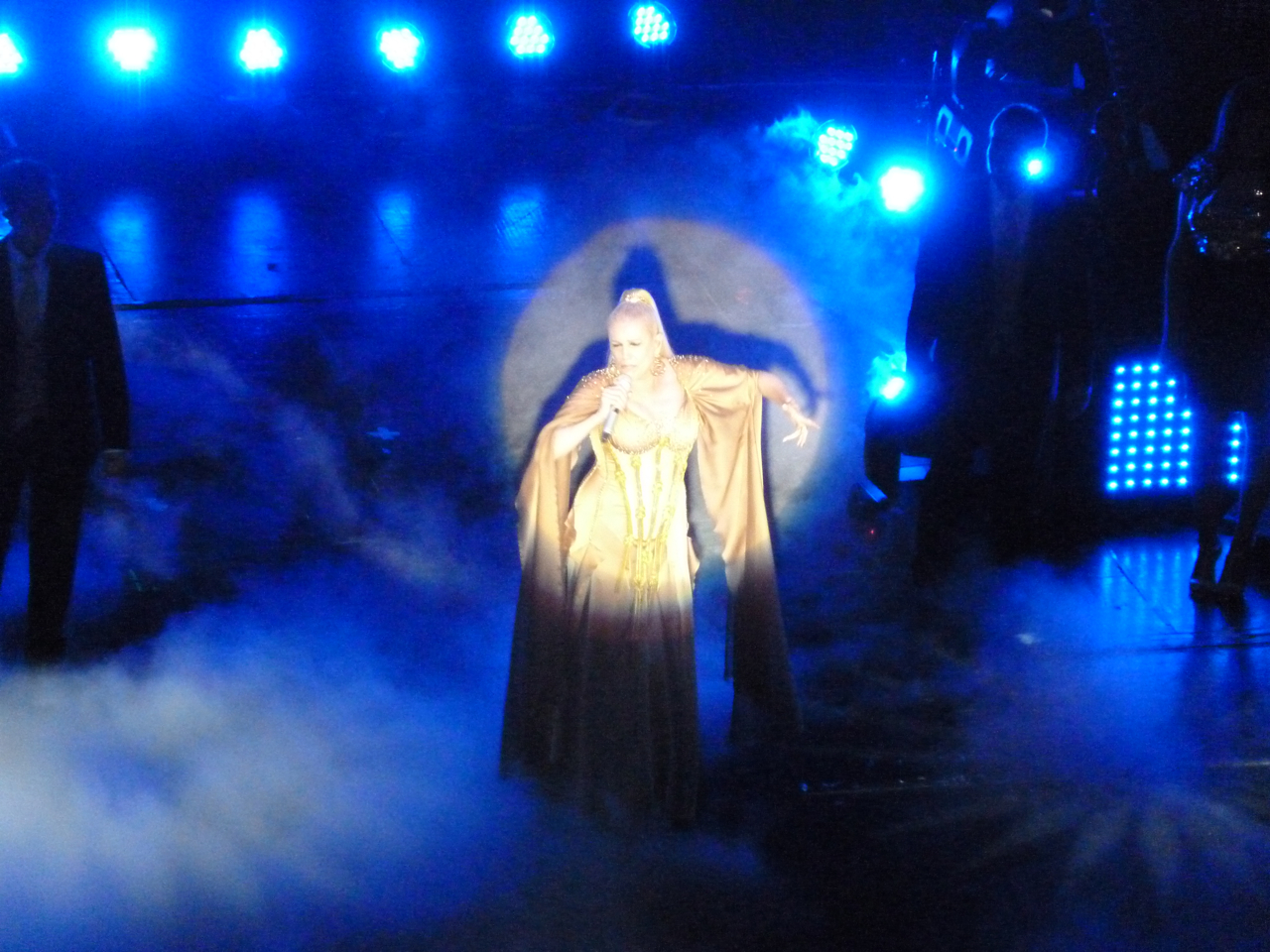 La cantante argentina Valeria Lynch durante la presentación de su recital "Loba" en el Teatro Gran Rex interpretando la canción "Como una loba".